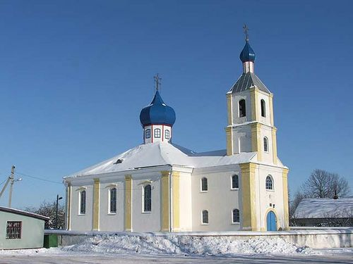 Царква Раства Багародзіцы. Лужкі